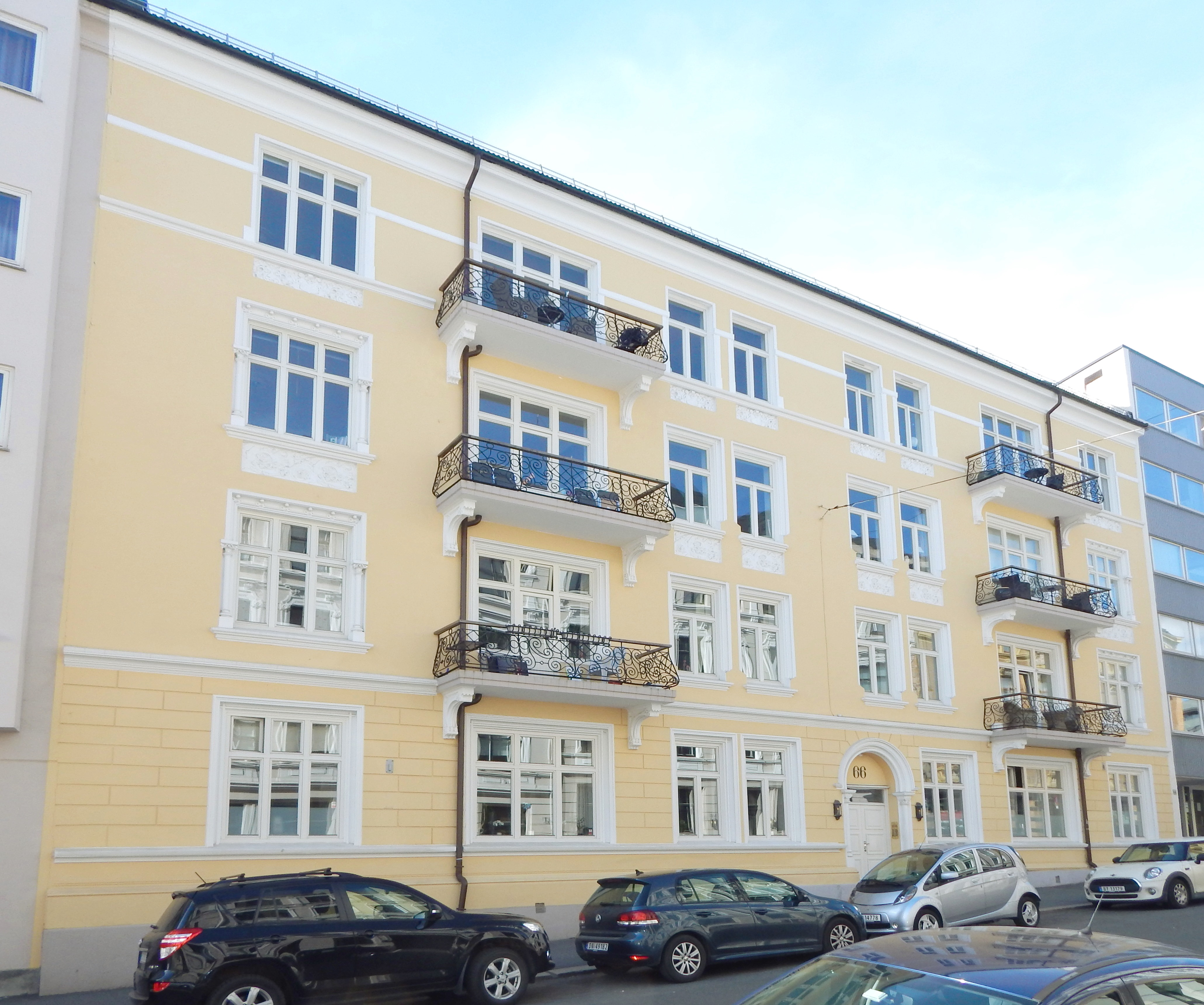 Niels Juels gate 66